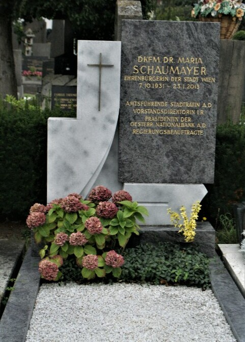 Maria Schaumayer-Friedhof Döbling